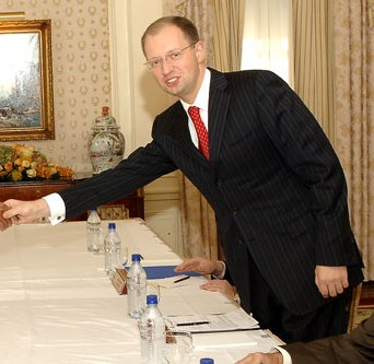 Arseniy Yatsenyuk